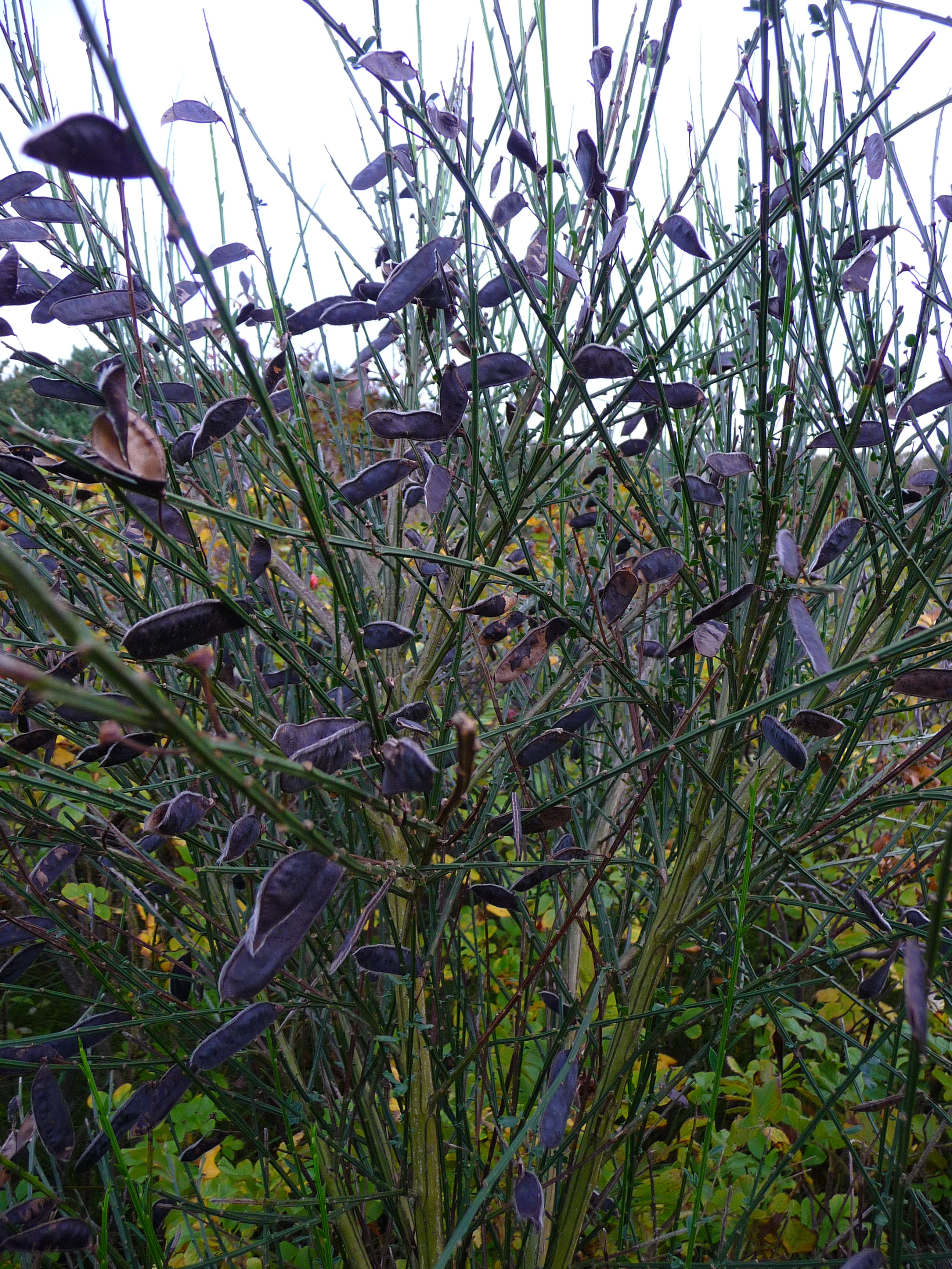 Besenginster (Cytisus scoparius)